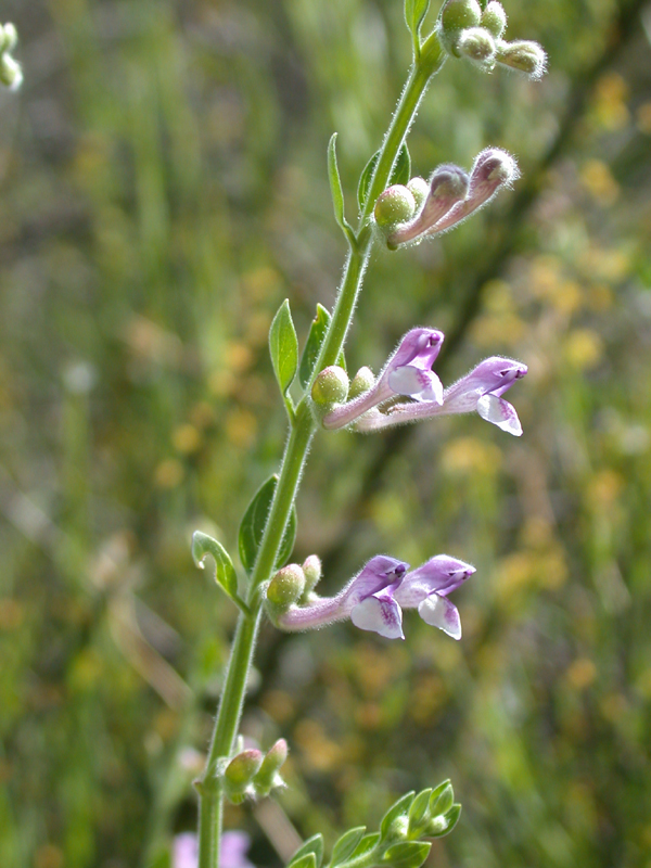 Scutellaria brevibracteata Stapf. (קערורית סגולה), Upper Galilee, Israel, May 2006. Also called Scutellaria peregrina L.; Scutellaria subvelutina Rech.f.; Scuterllaria rubicunda Hornem. var. subvelutina (Rech.f.) Edmondson.